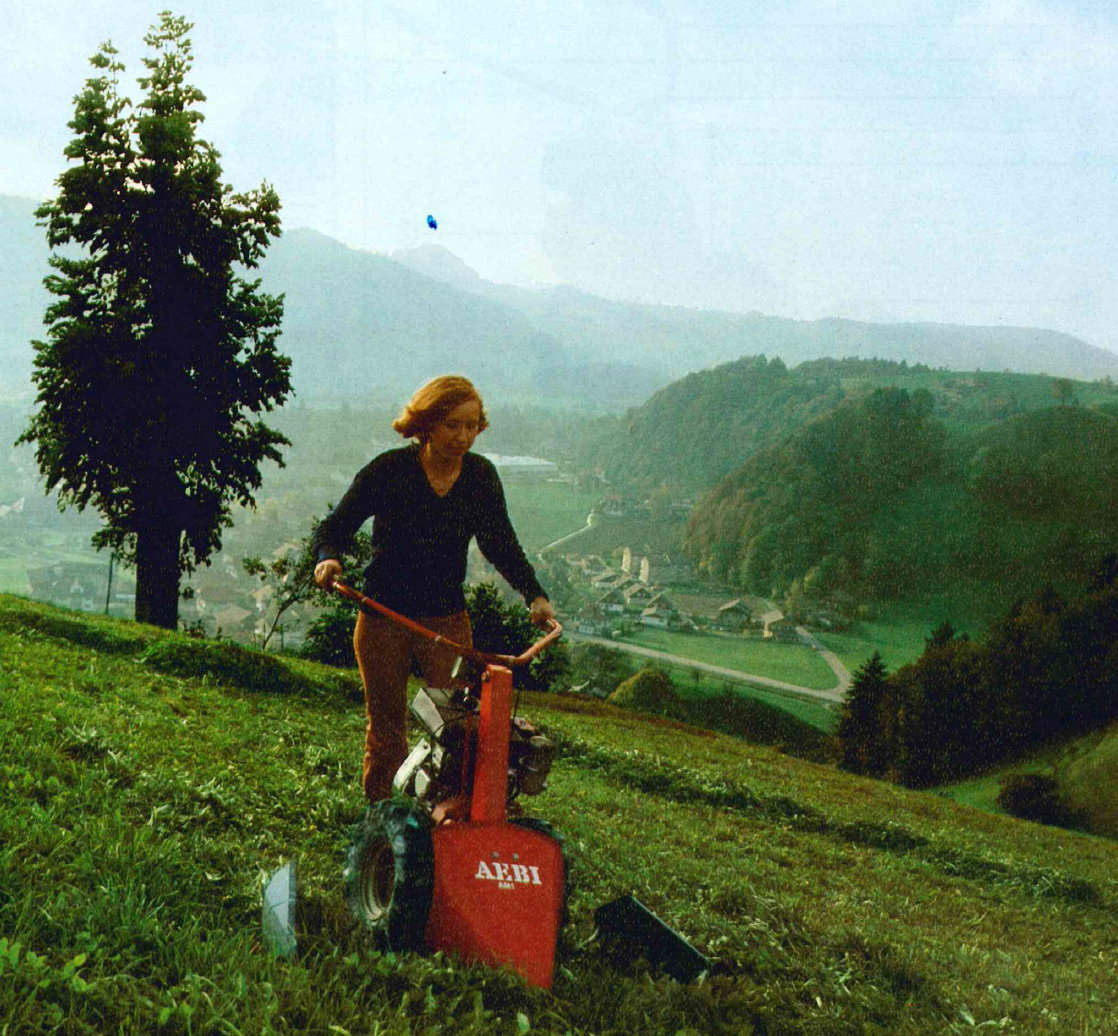 Aebi AM1